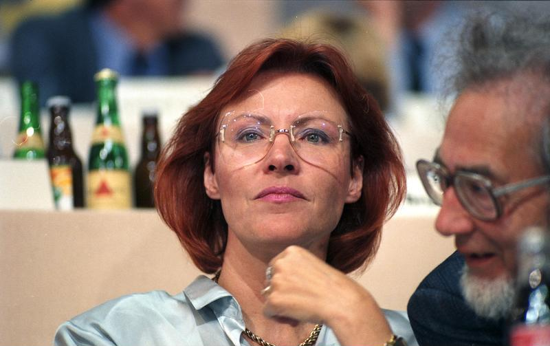 30.8.-2.9.1988 SPD-Parteitag in Münster, Halle Münsterland